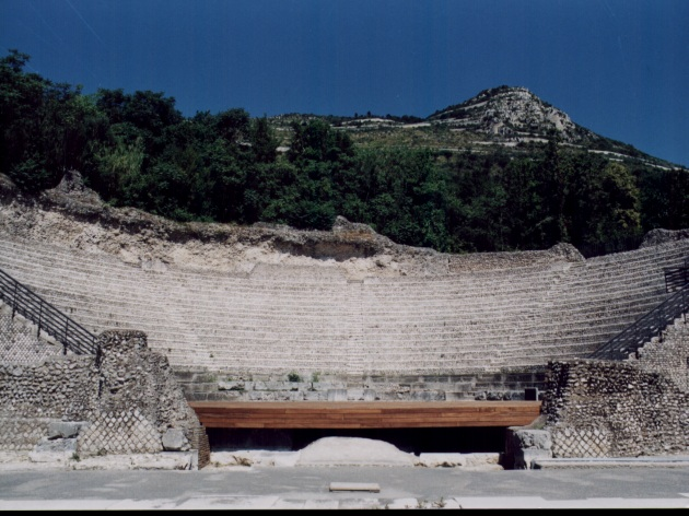 Teatro romano della città di Casinum (età augustea)